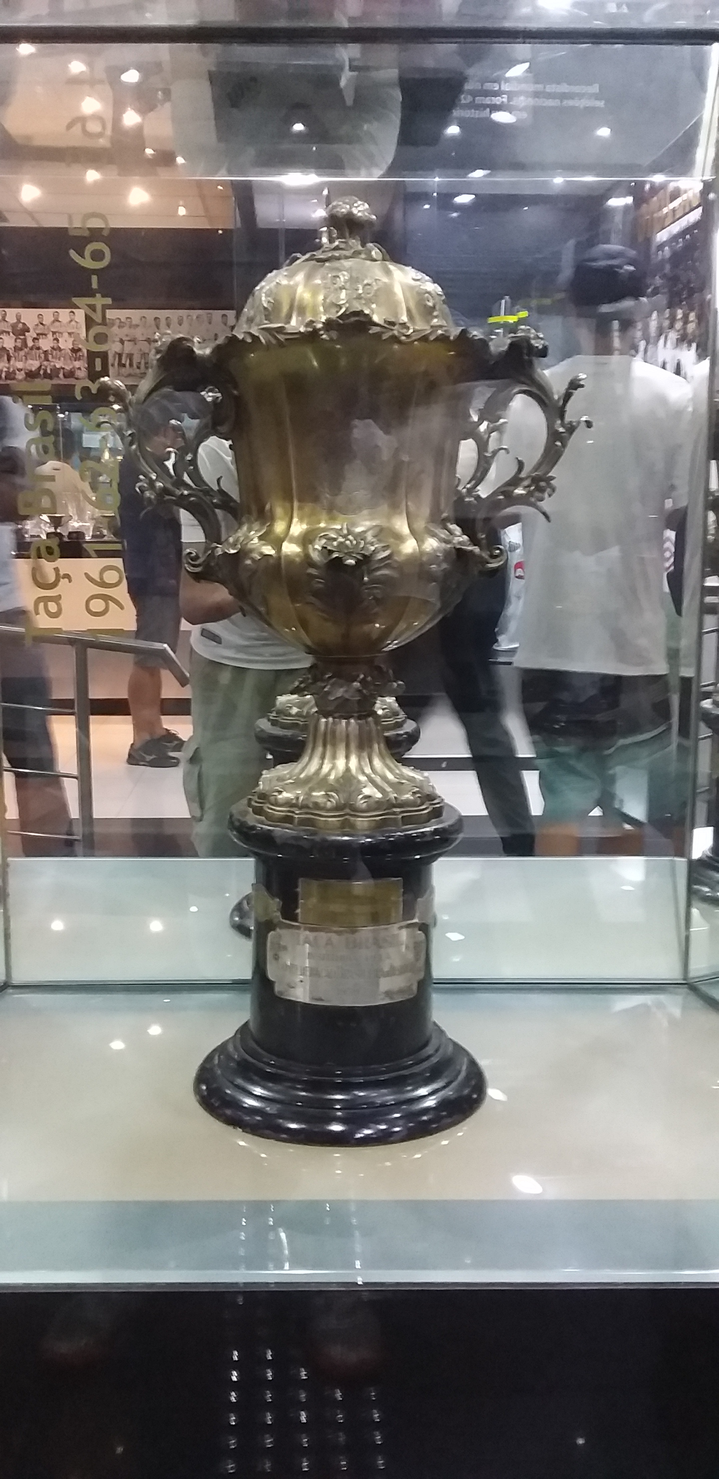 Taça Brasil conquistada em definitivo pelo Santos FC em 1965 após vencer o Campeonato Brasileiro cinco vezes seguidas nos anos 60 exposta no Memorial das Conquistas